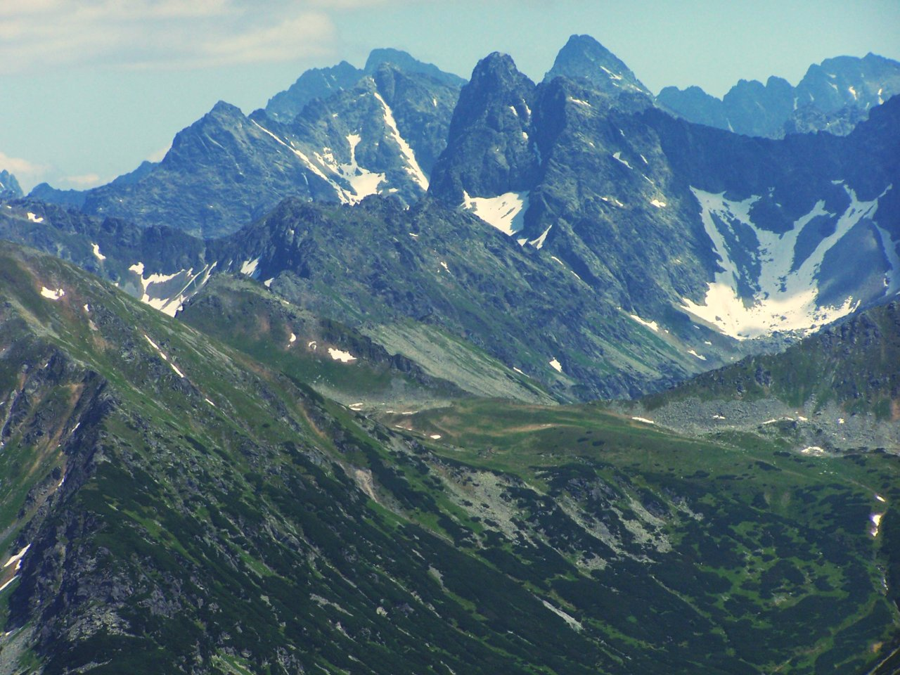 Tatra Mountains (pl.Tatry Wysokie - widok z Czerwonych Wierchów)